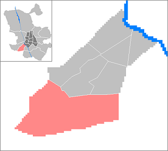 Barrio de Buenavista